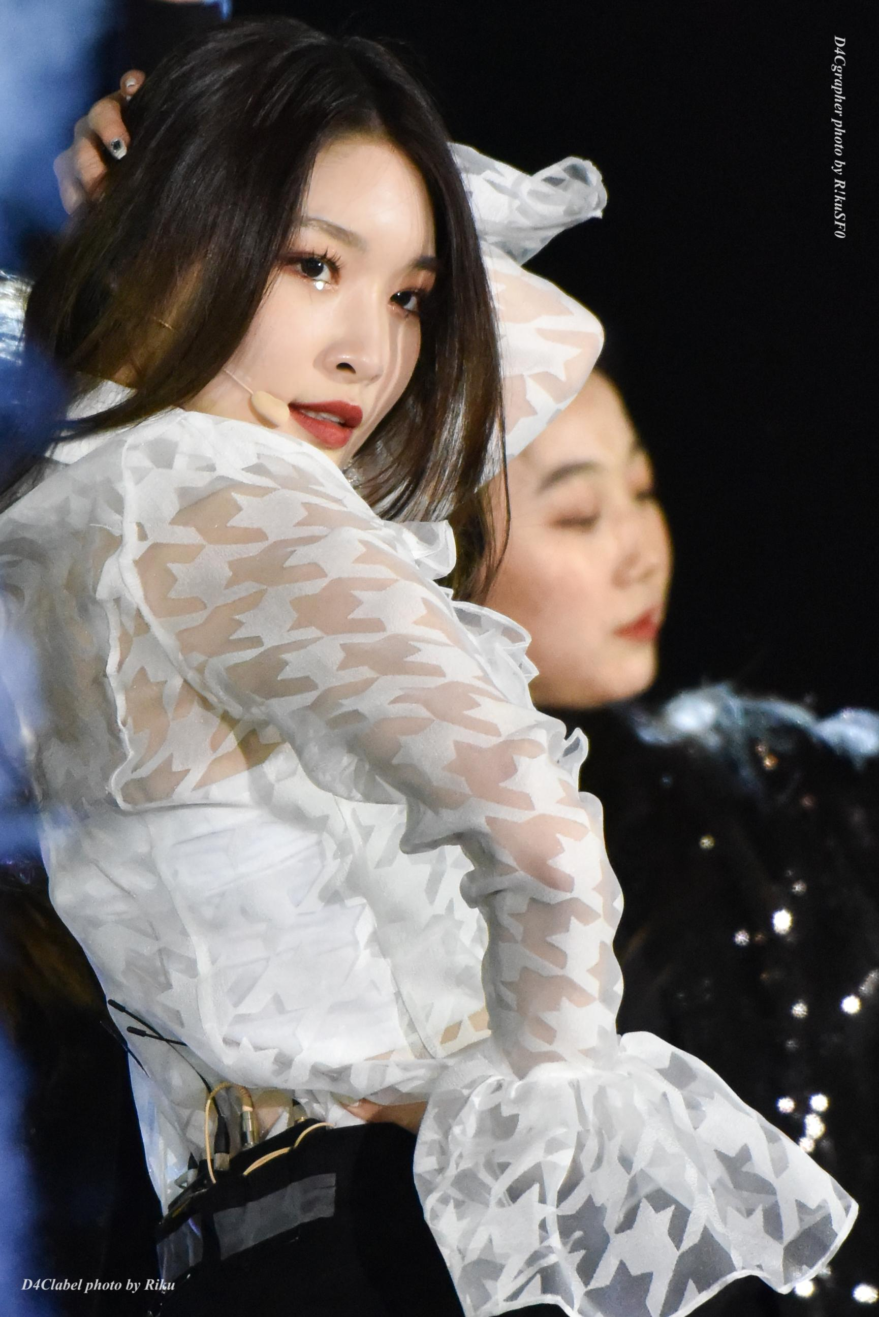 2018 평창 패럴림픽 성화 합화행사 축하공연